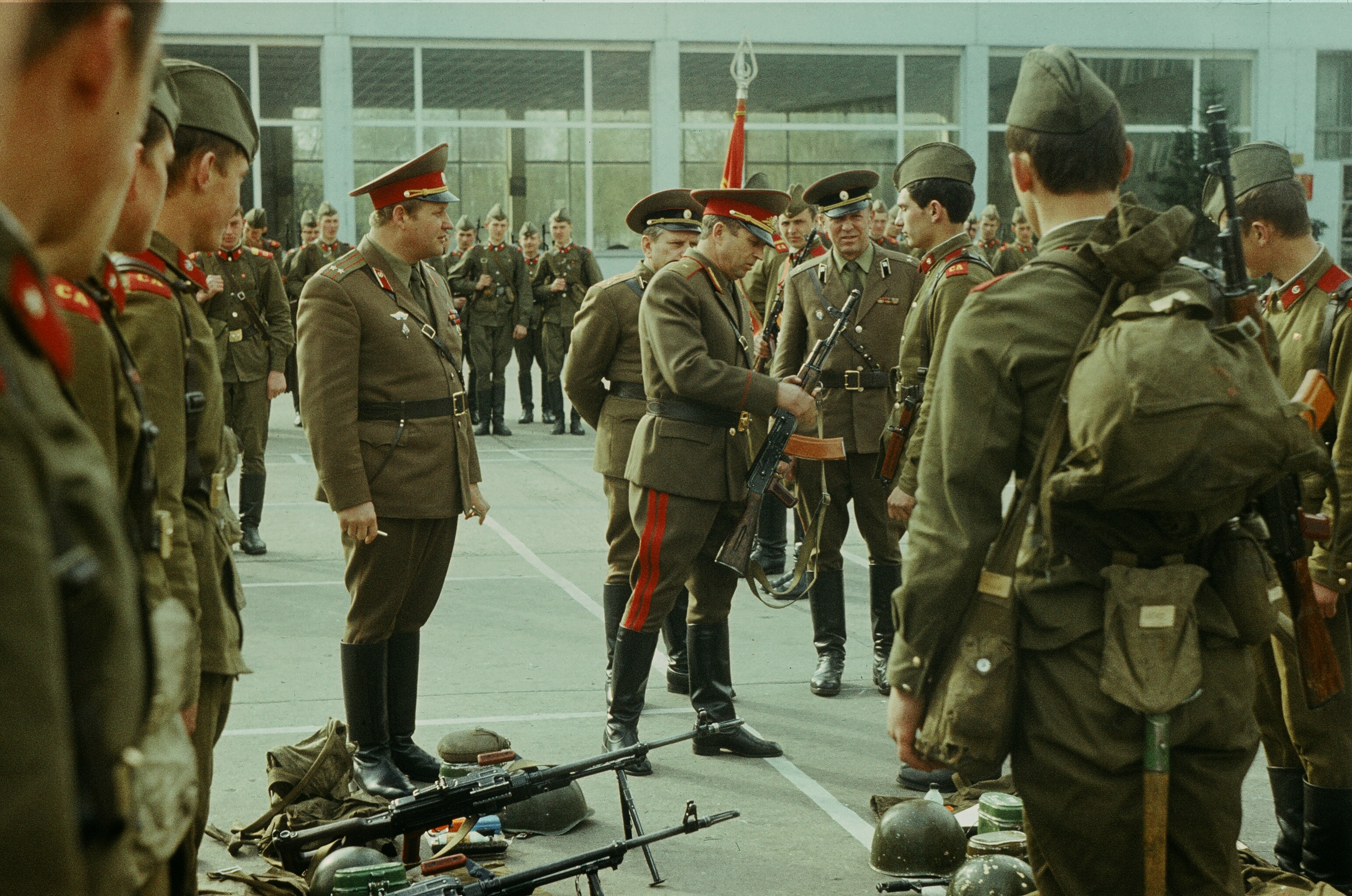 Начальник штаба 20-й ОА генерал-майор Матвеев и комбриг п/п-к Дорофеев А.А. инспектируют 178-й омсб капитана Синицина В.В. Берлин Карлхорст. 1981 г